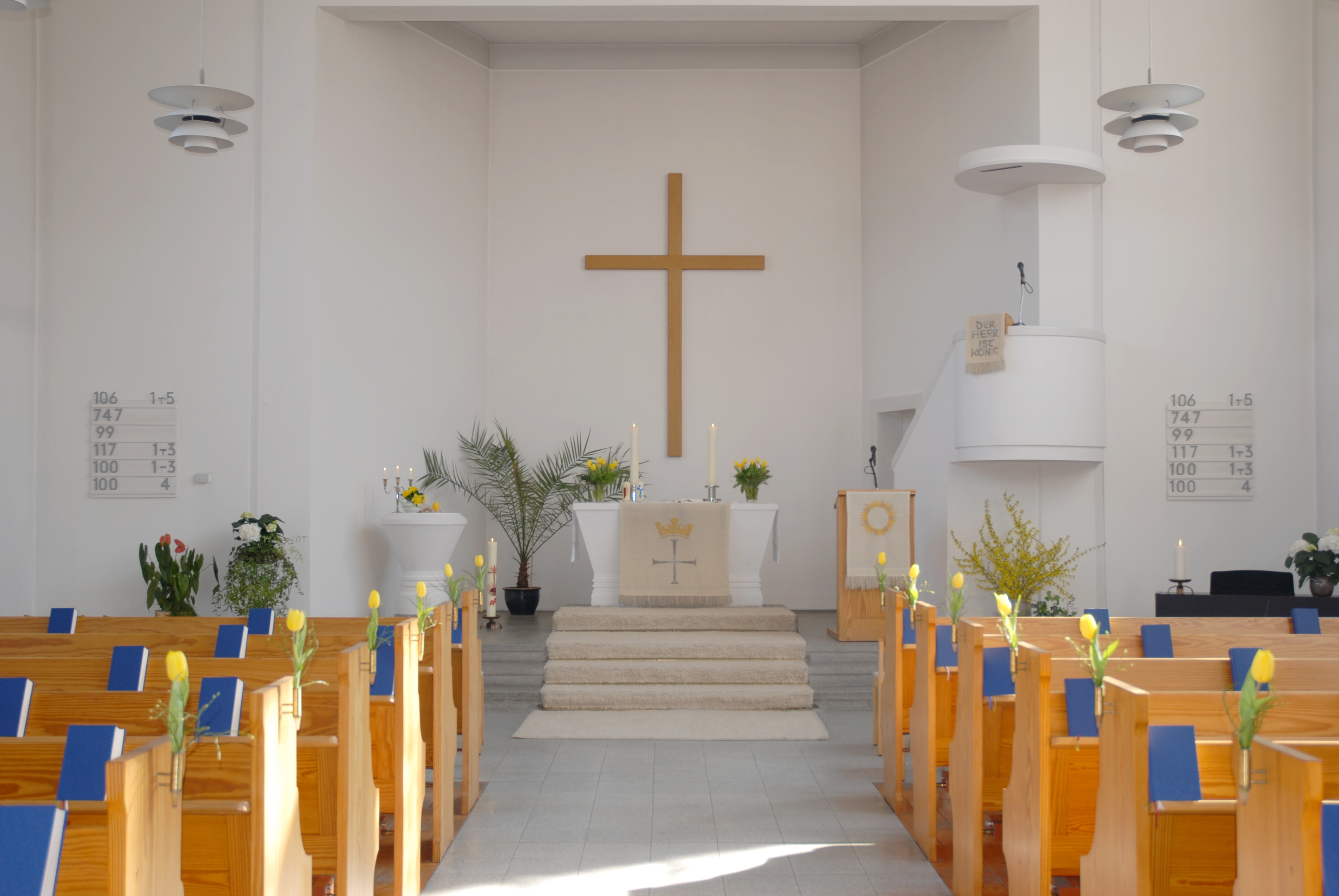 Innenansicht der Friedenskirche Wiesmoor